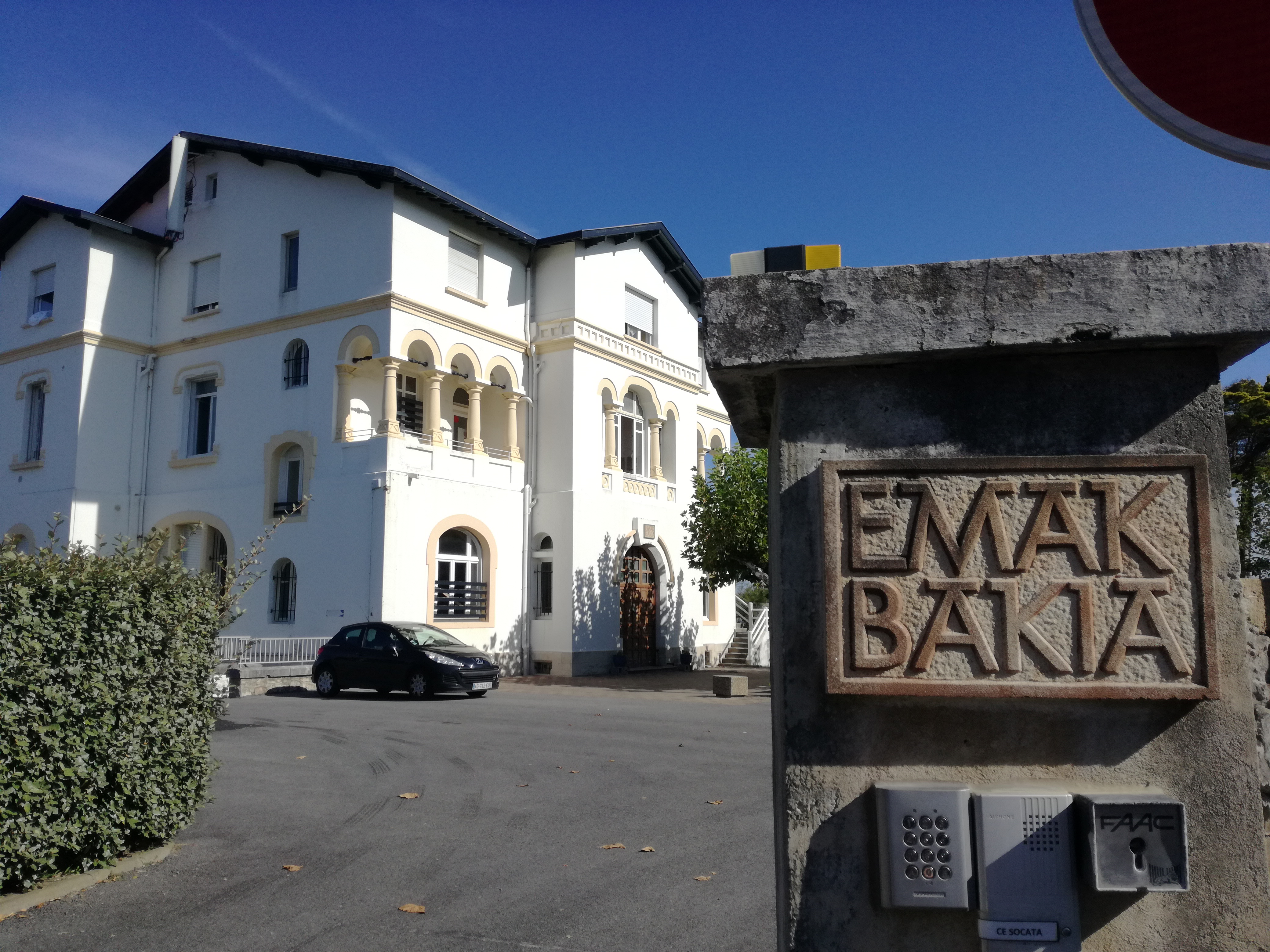 Bidarteko kostaldeko etxea. 1912an eraikia, Man Ray-ren Emak Bakia filma han errodatu zen.